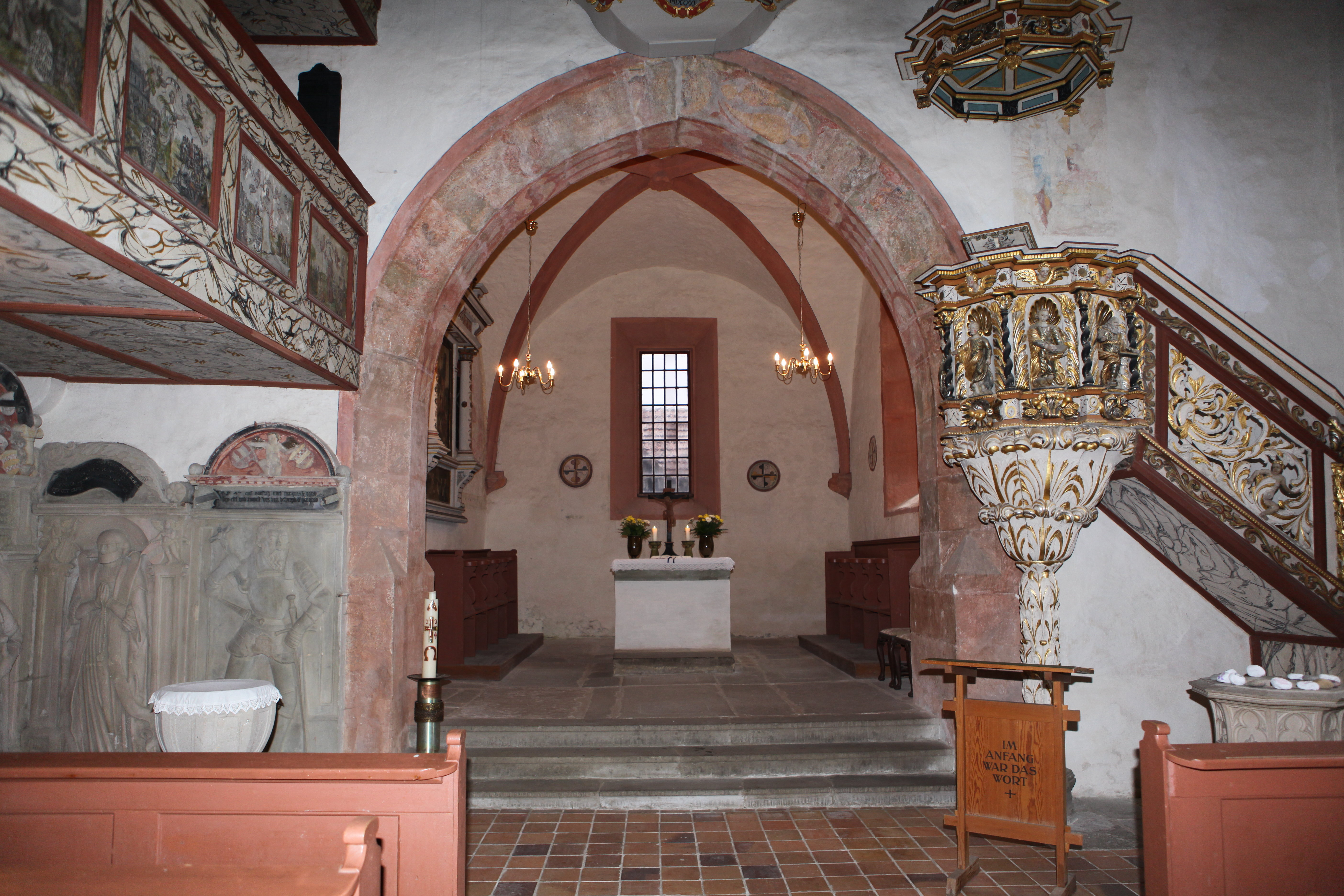 Bedheim-St.Kilian-Chor